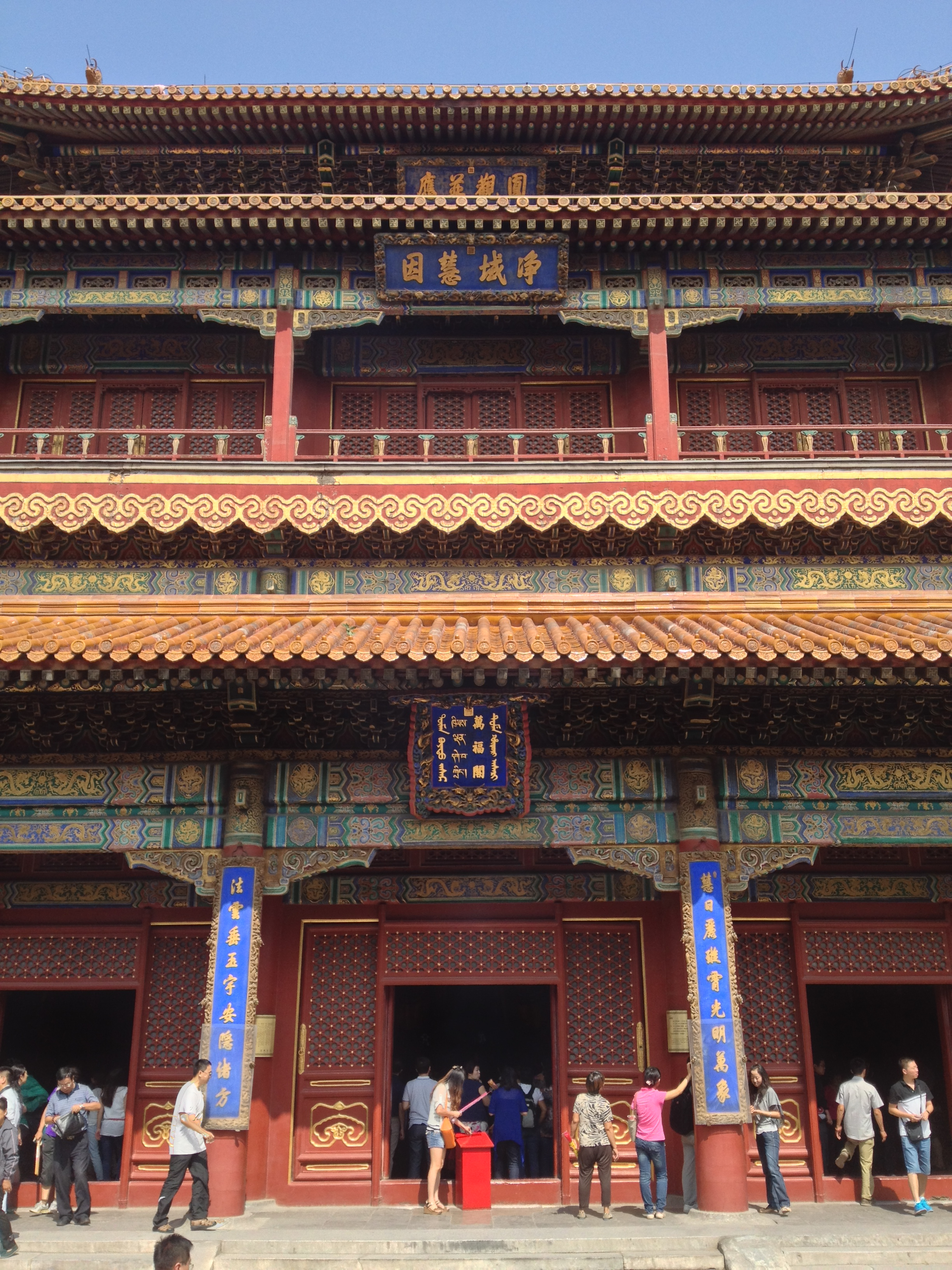 中文（中国大陆）: 雍和宫-永福阁，正门